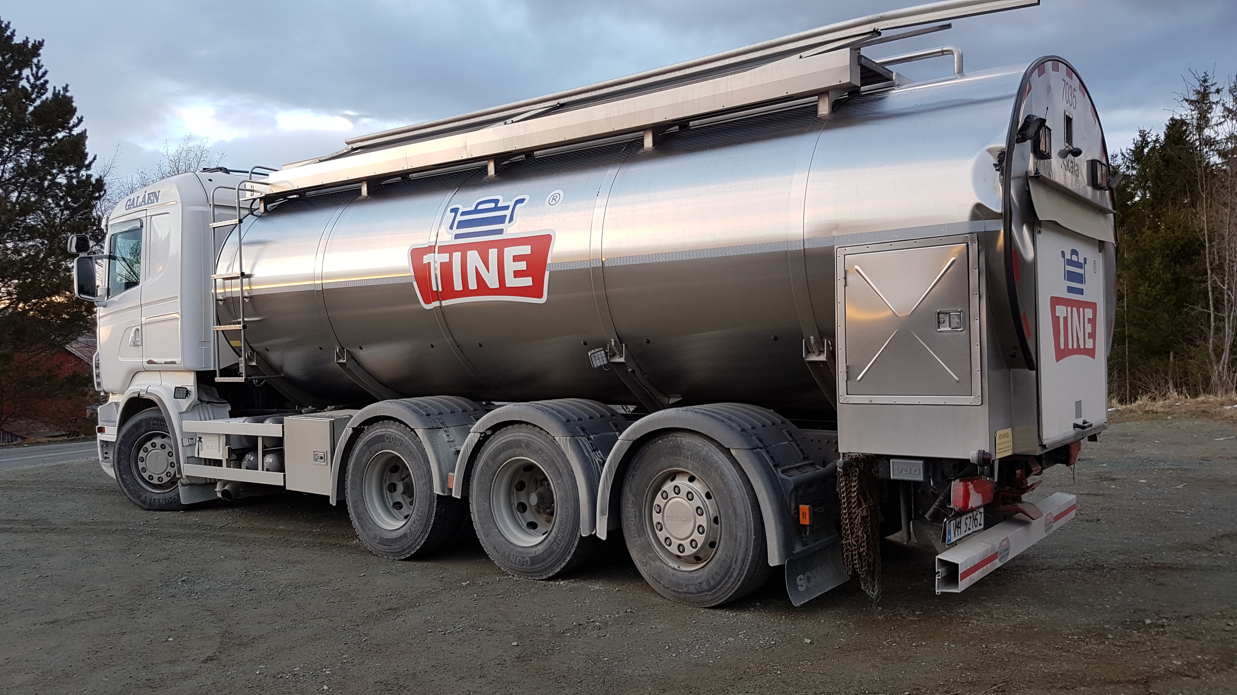 Tine